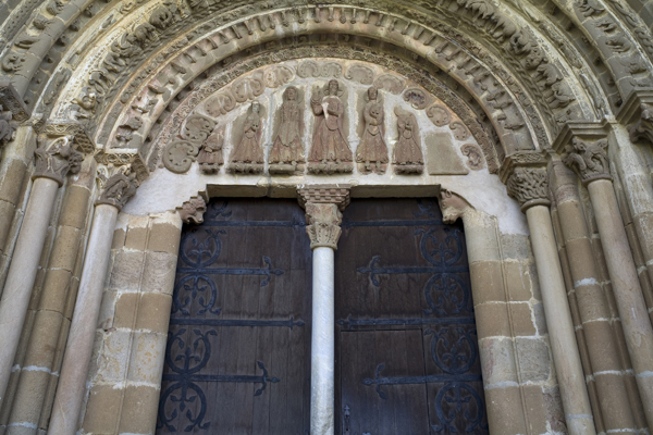 unidentified Spain